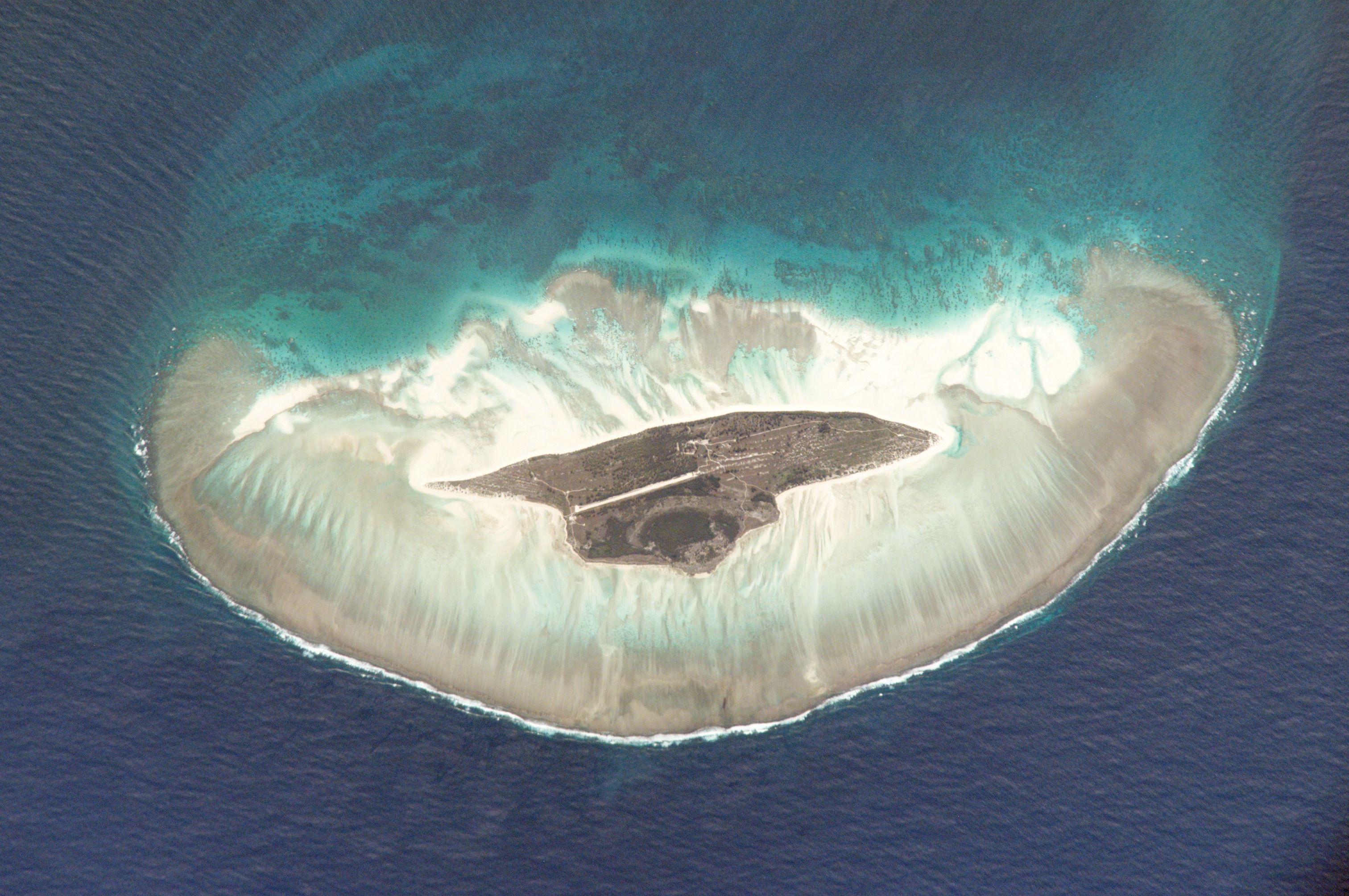 Zdjęcie wyspy Juan de Nova i otaczających płycizn i raf